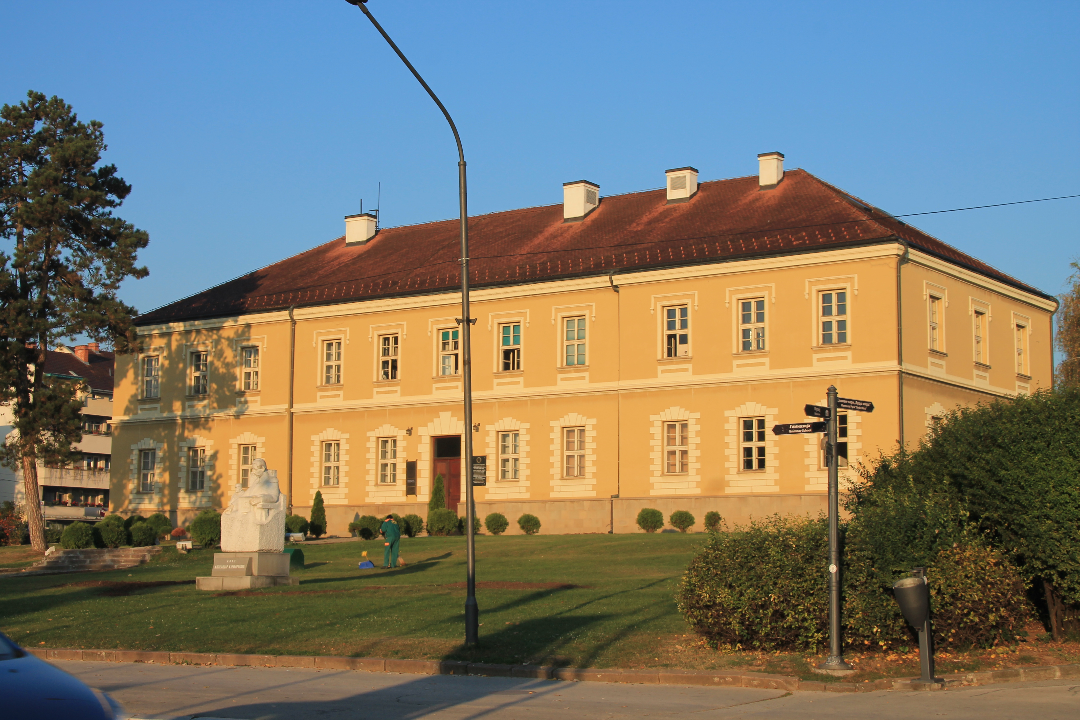 Zgrada Okružnog načelstva, Gornji Milanovac